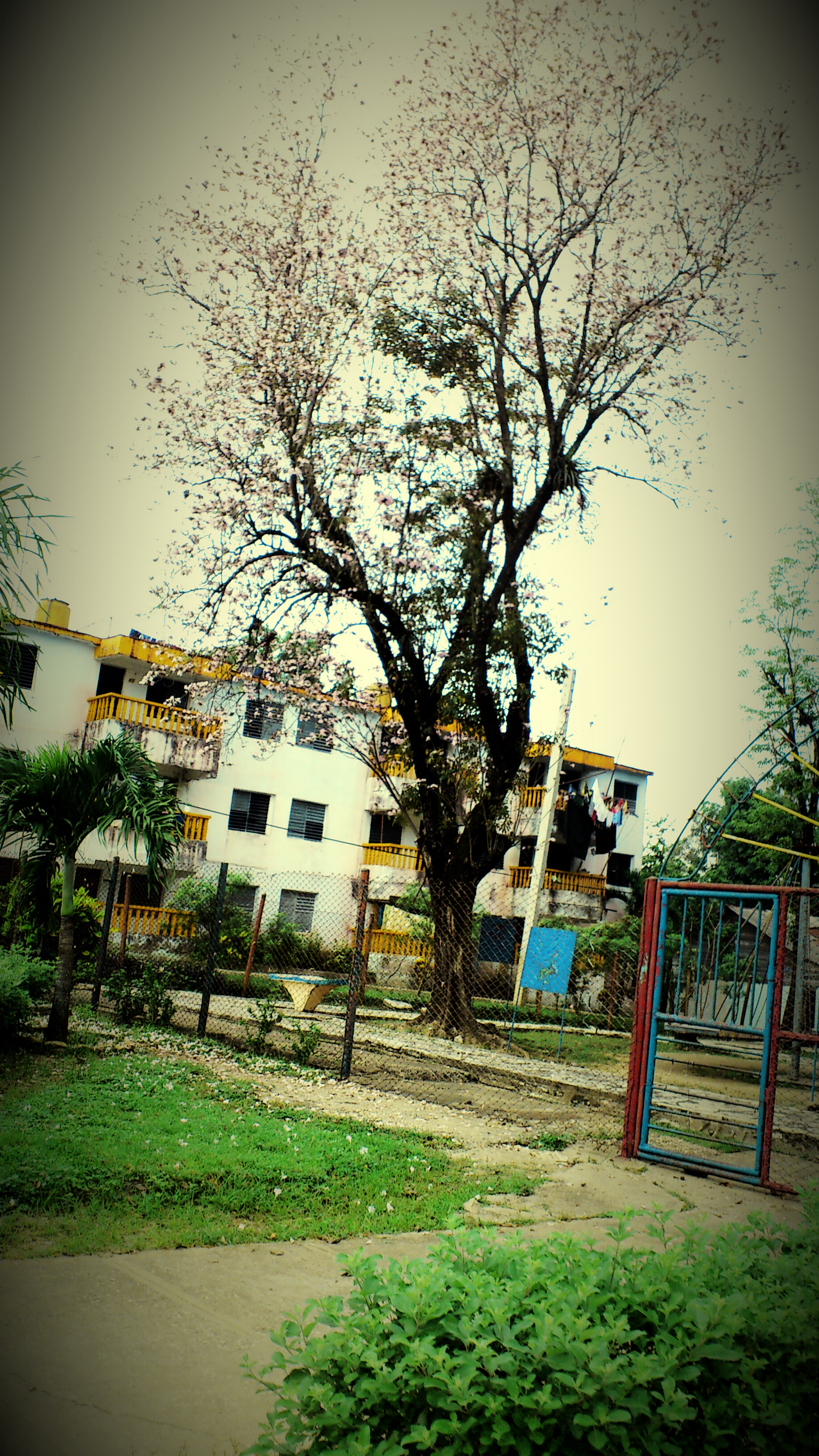 Costa Rica, Cuba